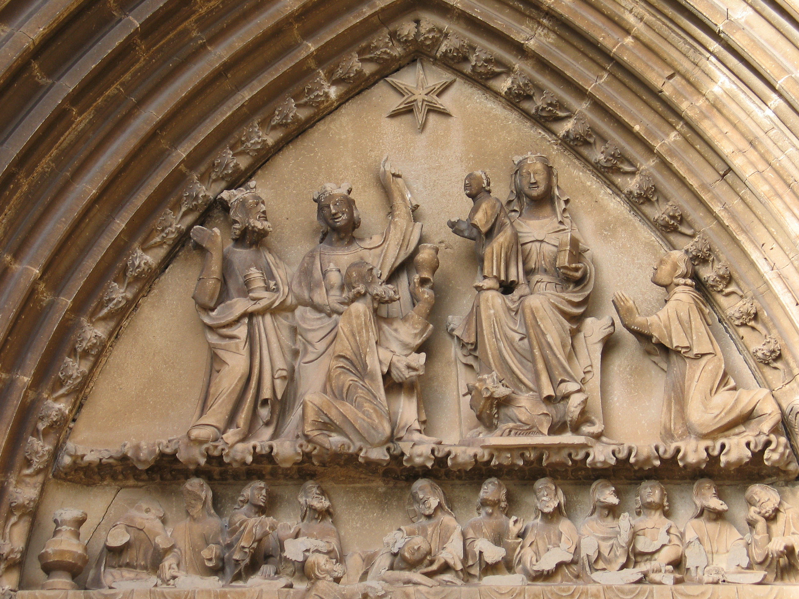 Santa Maria eliza. Uxue. Nafarroa